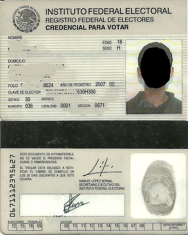 Credencial de Elector de México